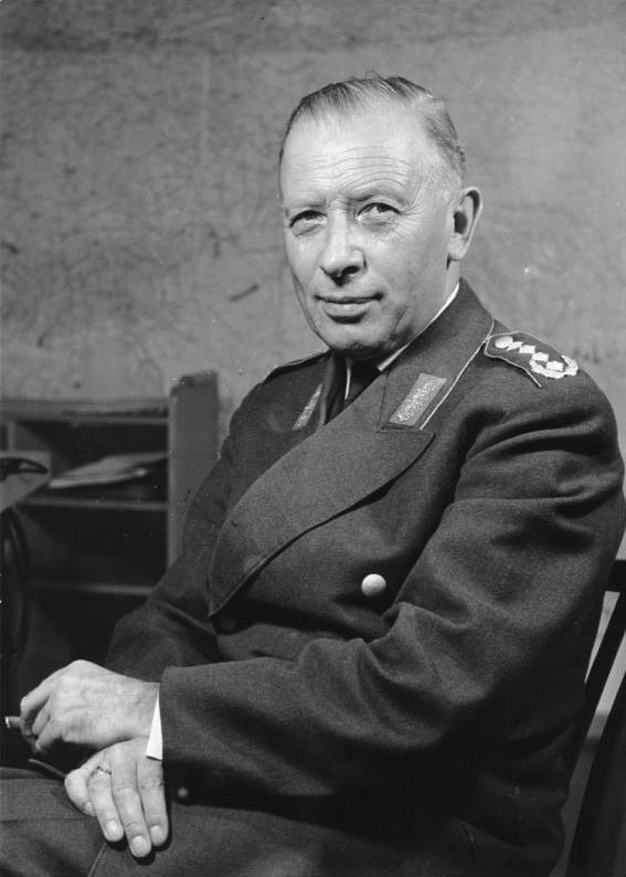 Heusinger, Adolf, Generalinspekteur der BW 1.4.1957 - 31.3.1961